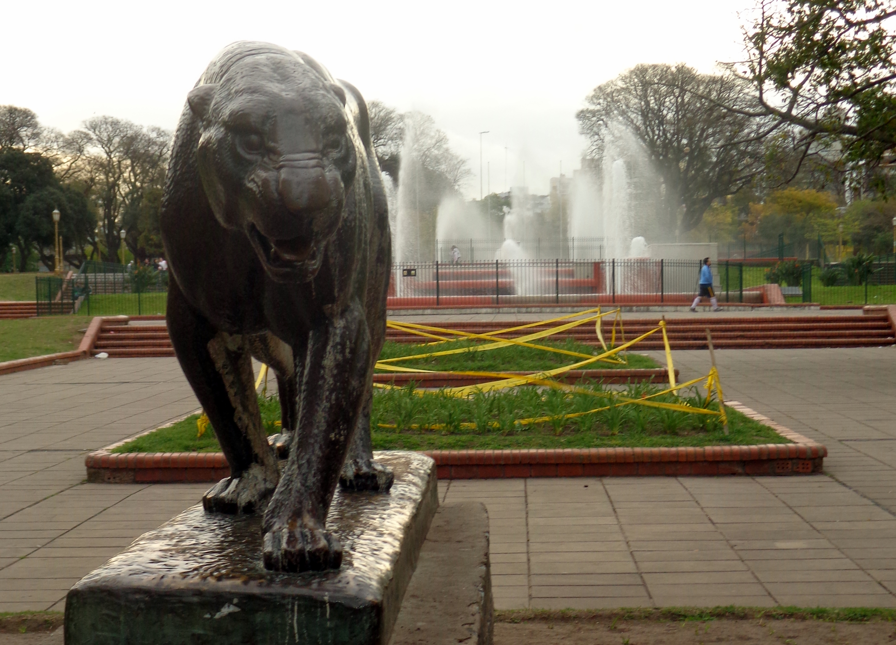 Escultura Yaguareté de Emilio Jacinto Sarniguet en Parque Chacabuco, Buenos Aires, Argentina.